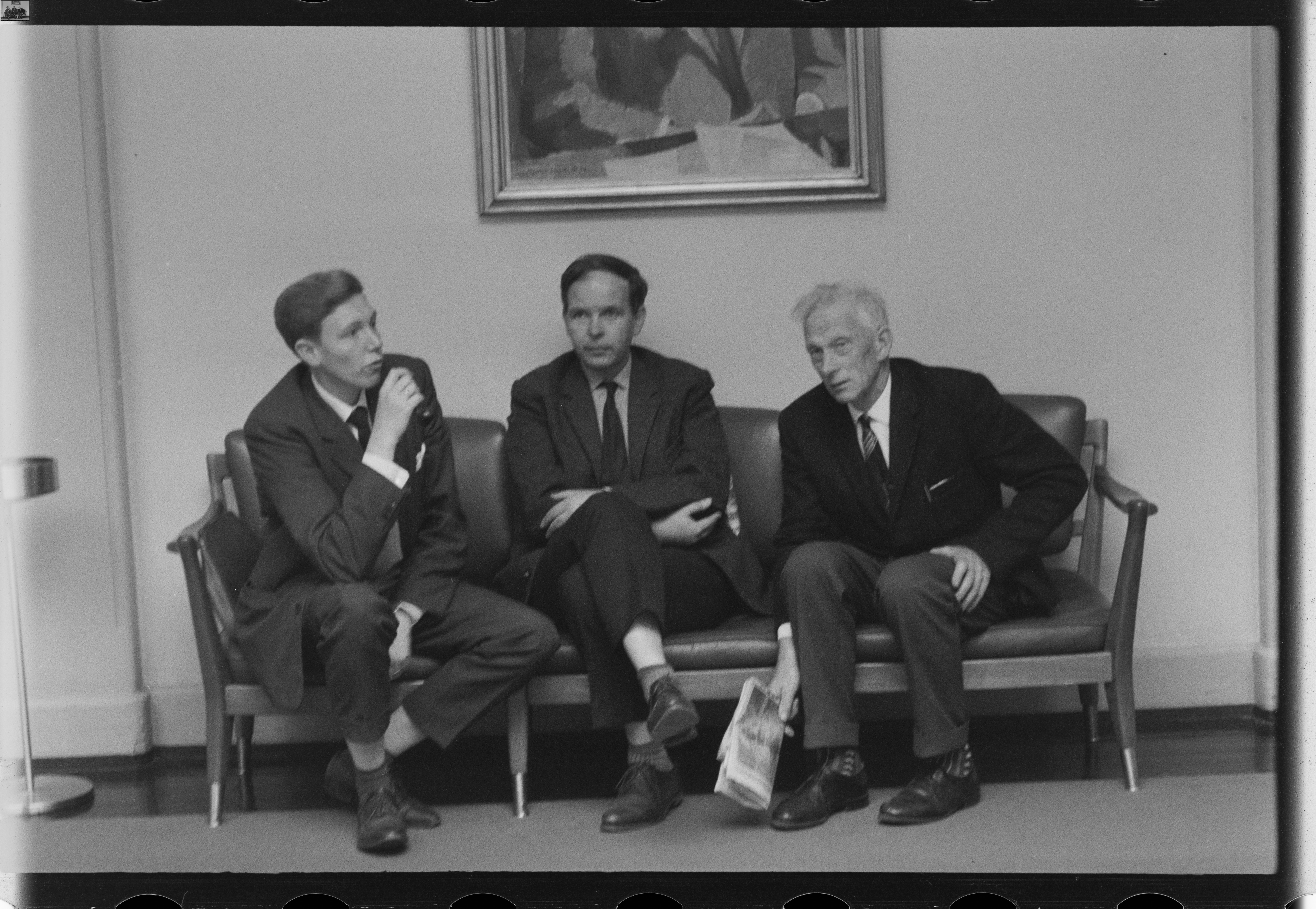 Bildet er hentet fra Arkivverket. Regjeringen Lyngs siste dag, fra debatten i Stortinget Arkivinstitusjon : Riksarkivet Arkivnavn : Billedbladet NÅ Sted : Norge, Oslo, Oslo, Stortinget Emneord: Regjeringer, Lyng Avbildet